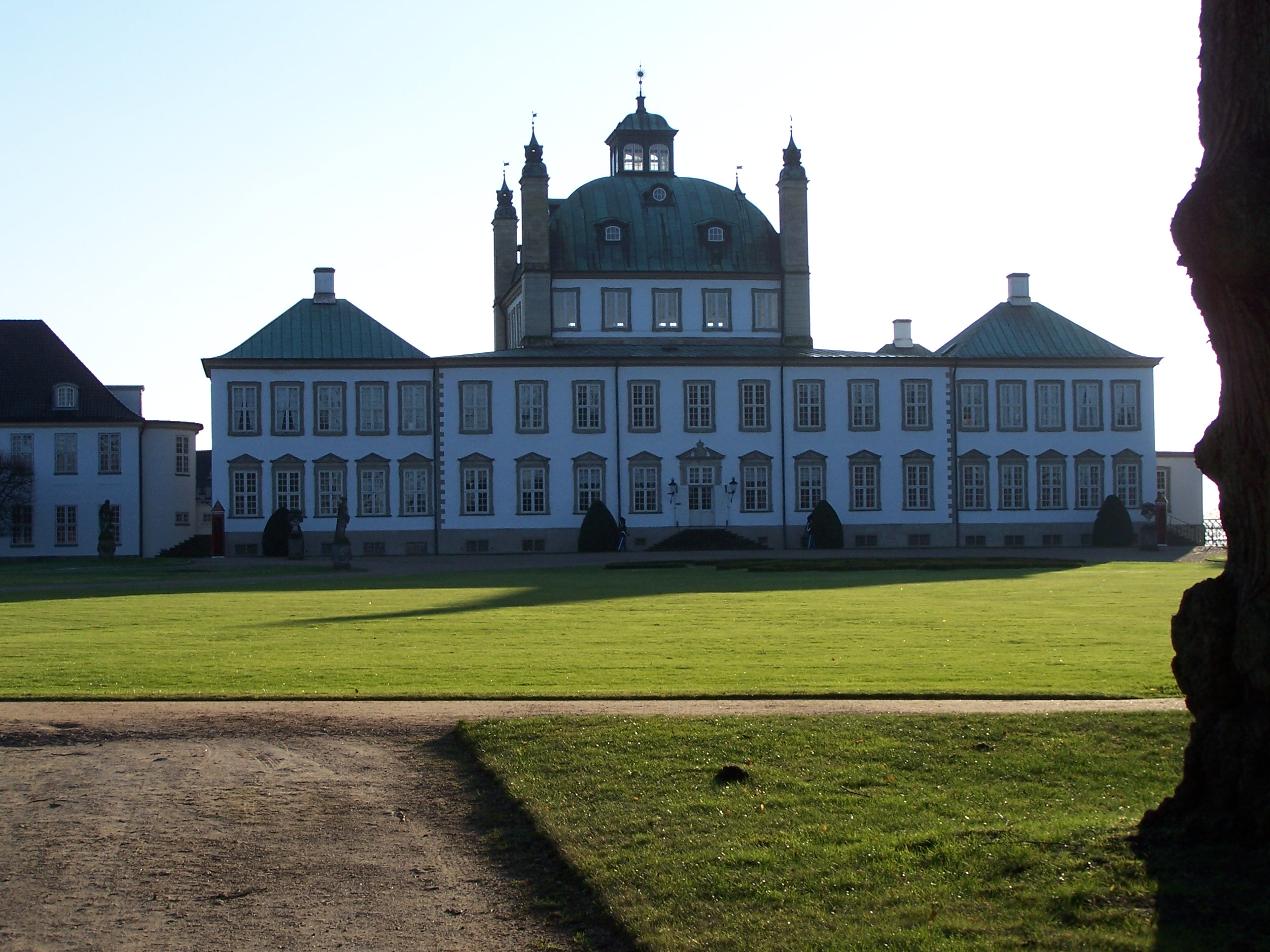 Garden at Fredensborg Castle, Denmark